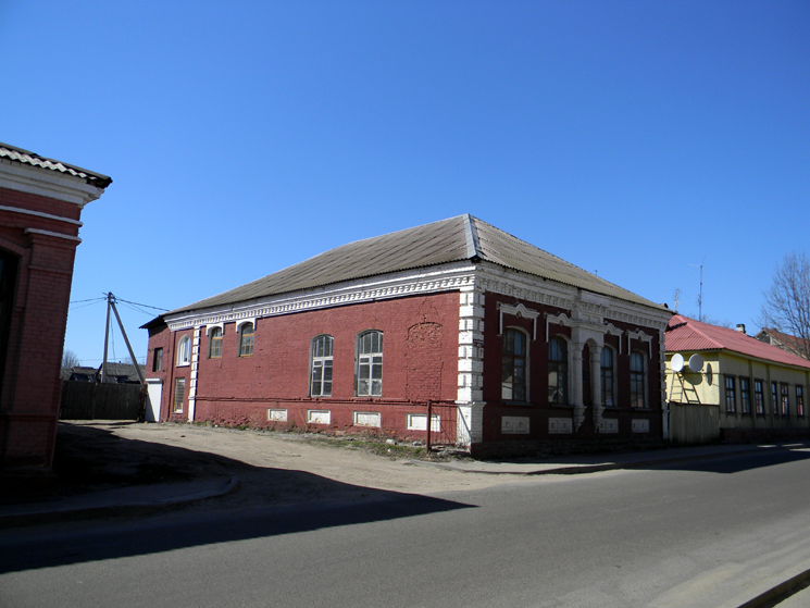 Сінагога Хеўрэ Тылім